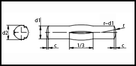 ISO 8742